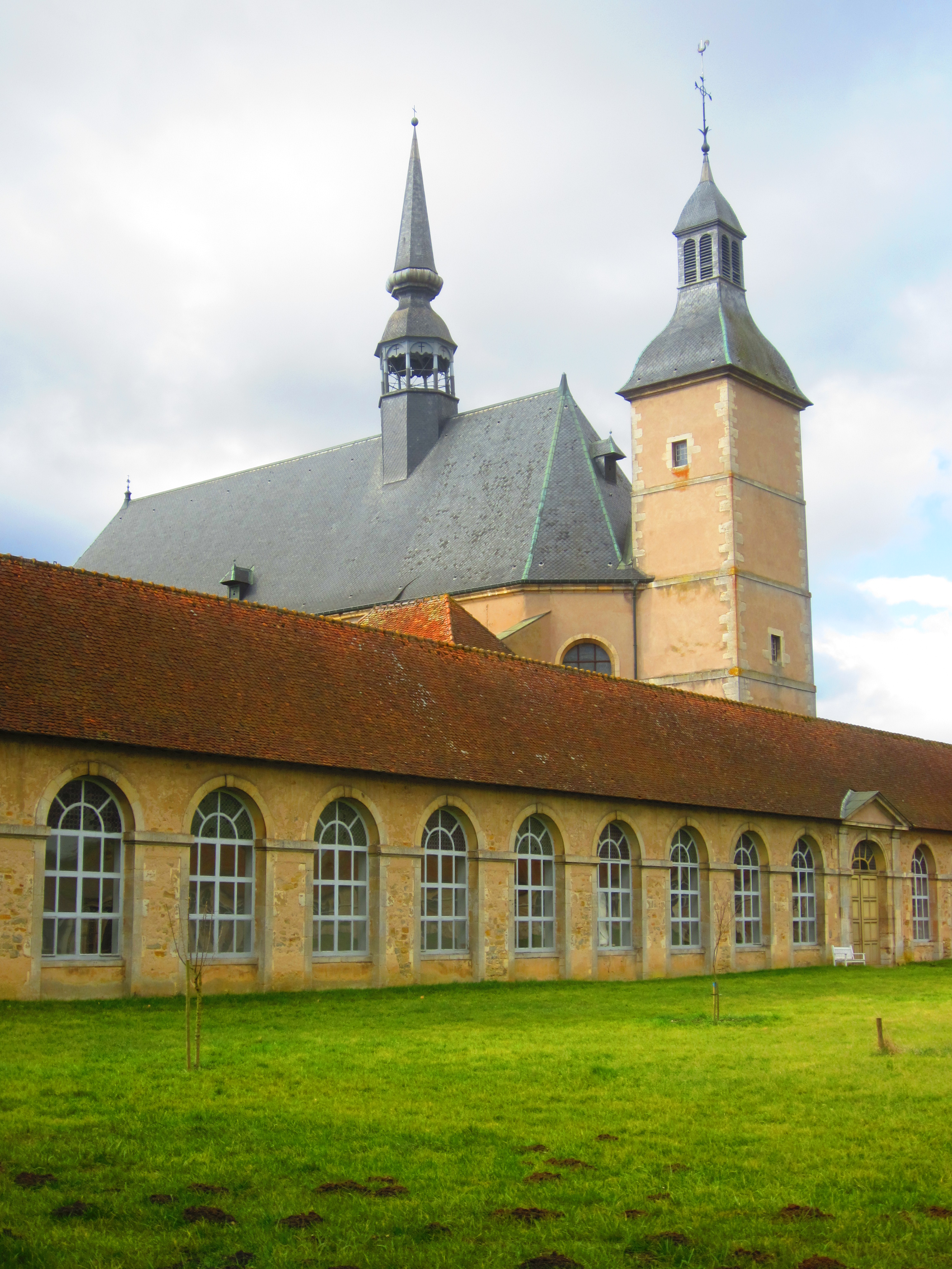 Bosserville abbaye chartreuse (15)